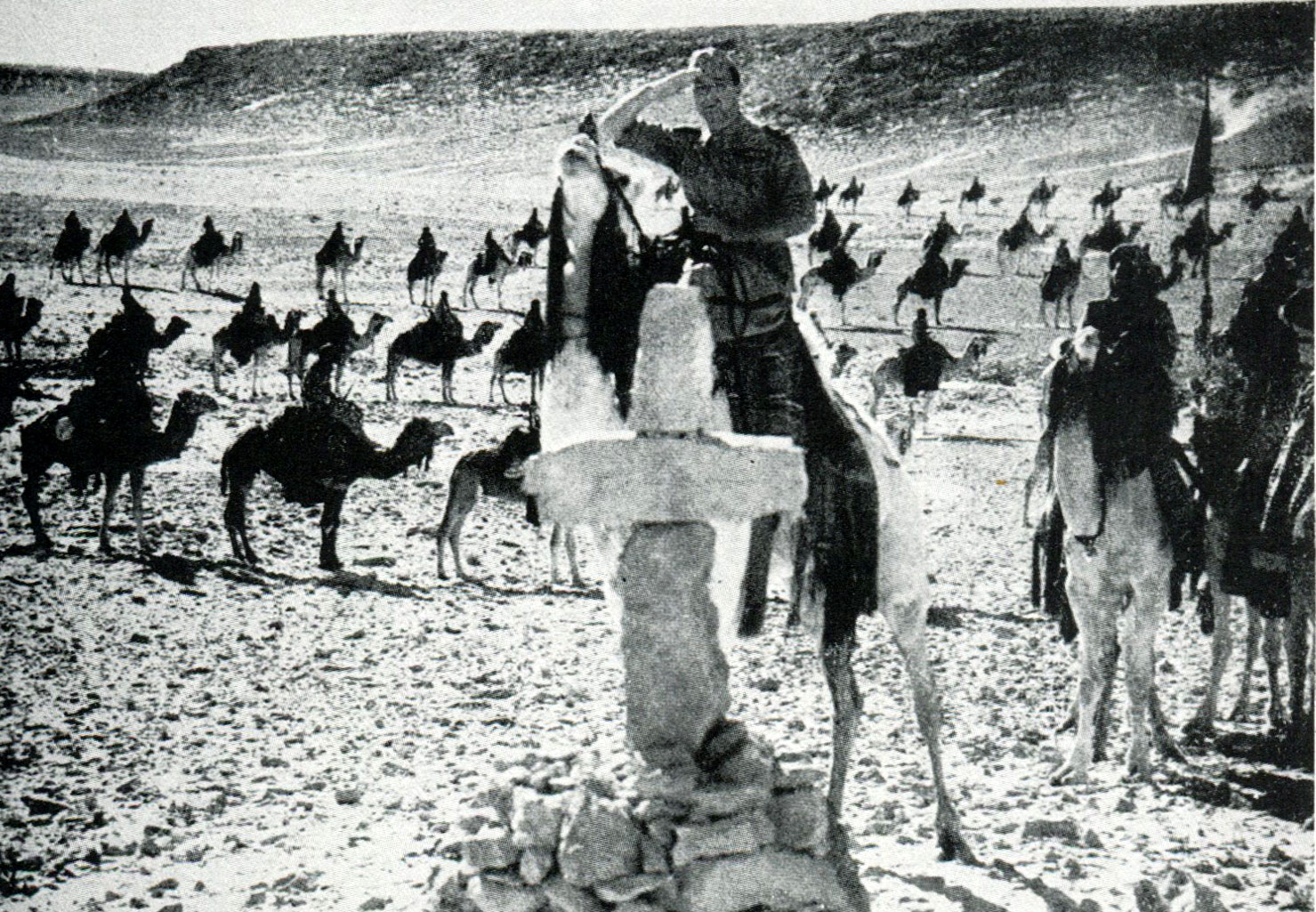 Il saluto ai caduti ne "Lo squadrone bianco" (Genina, 1936)